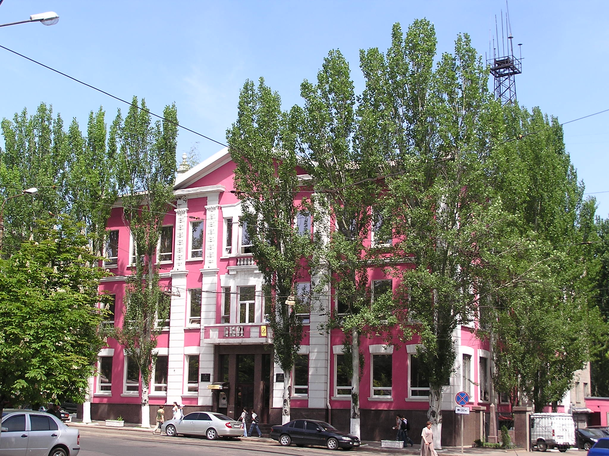 Ворошиловский район Донецка